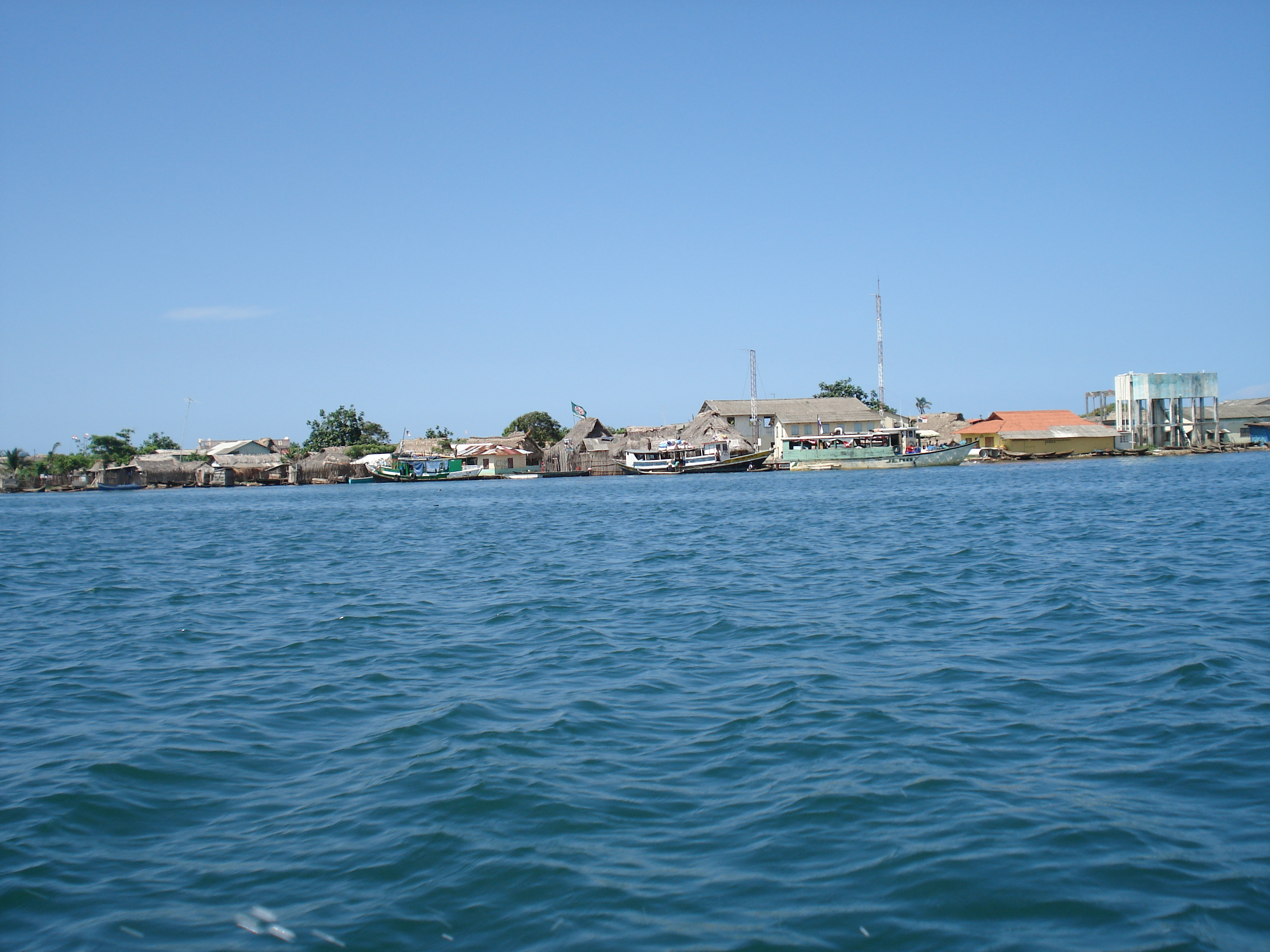 El puerto de Ustupo con barcos de comerciantes colombianos